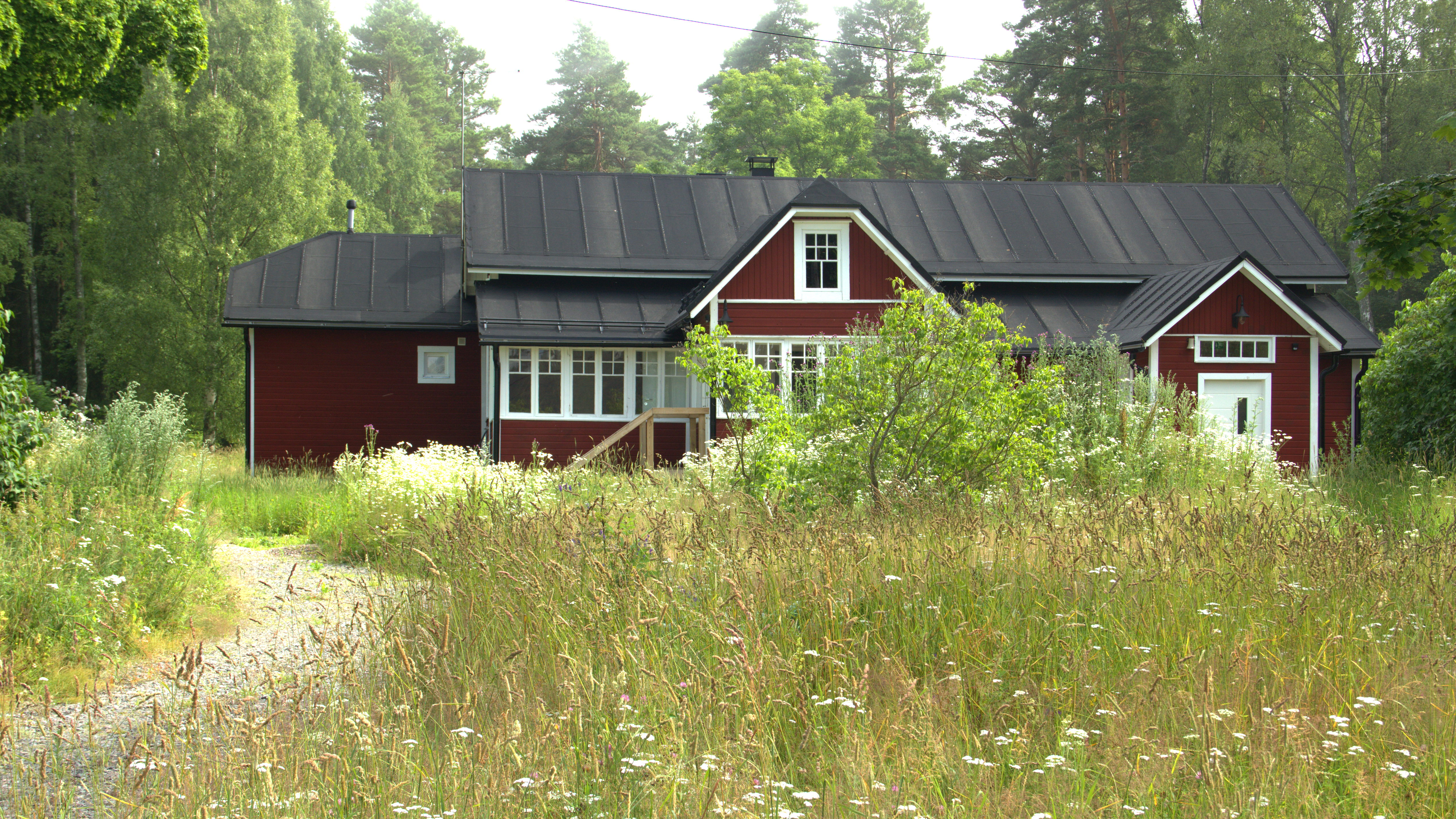 Päärakennus Särkkäniemen tien suunnalta